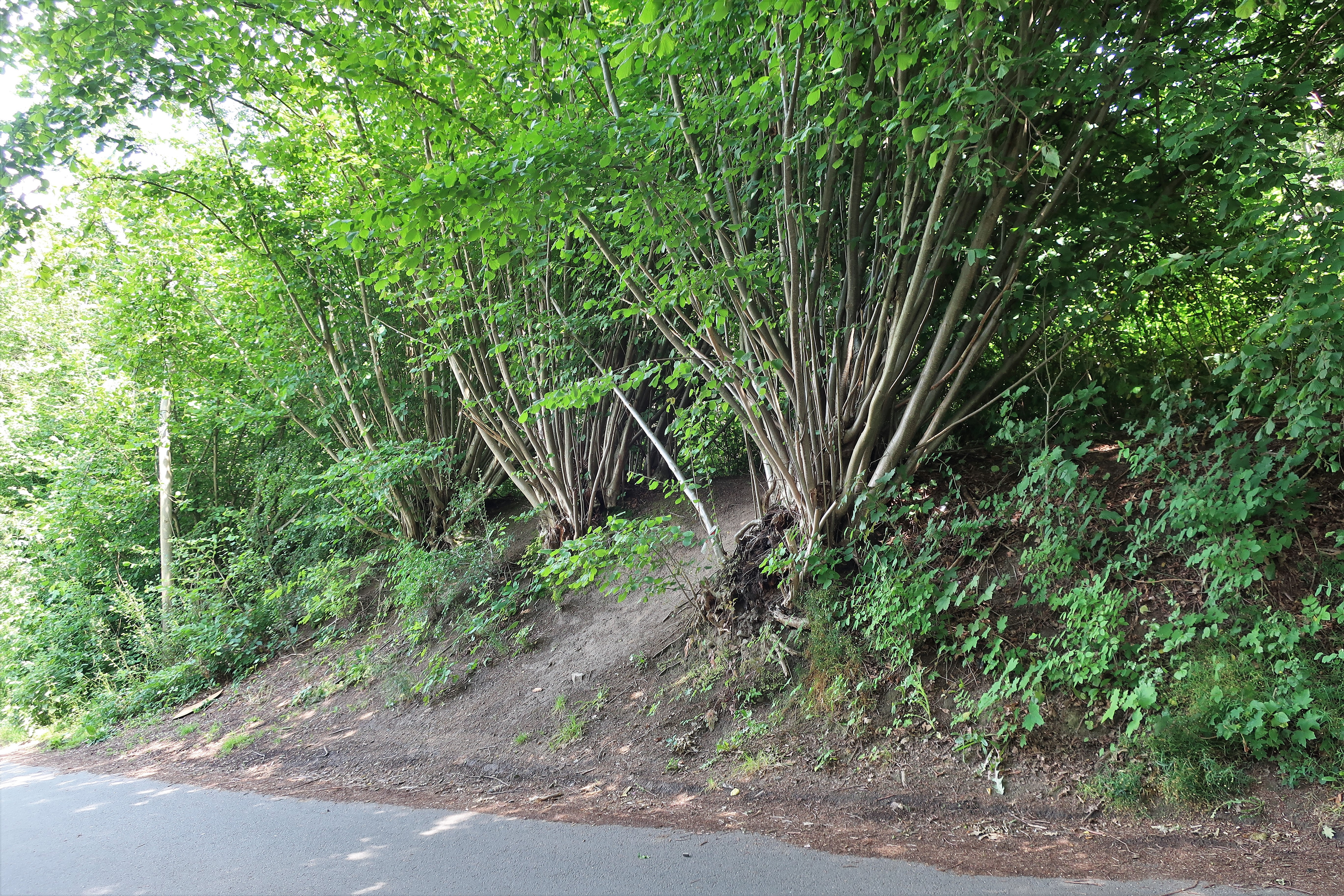 Geschützter Landschaftsbestandteil 1.4.2.6 „Kopfbäume am Alten Hellweg“ in Hagen-Helfe, südlich der Pappelstraße.